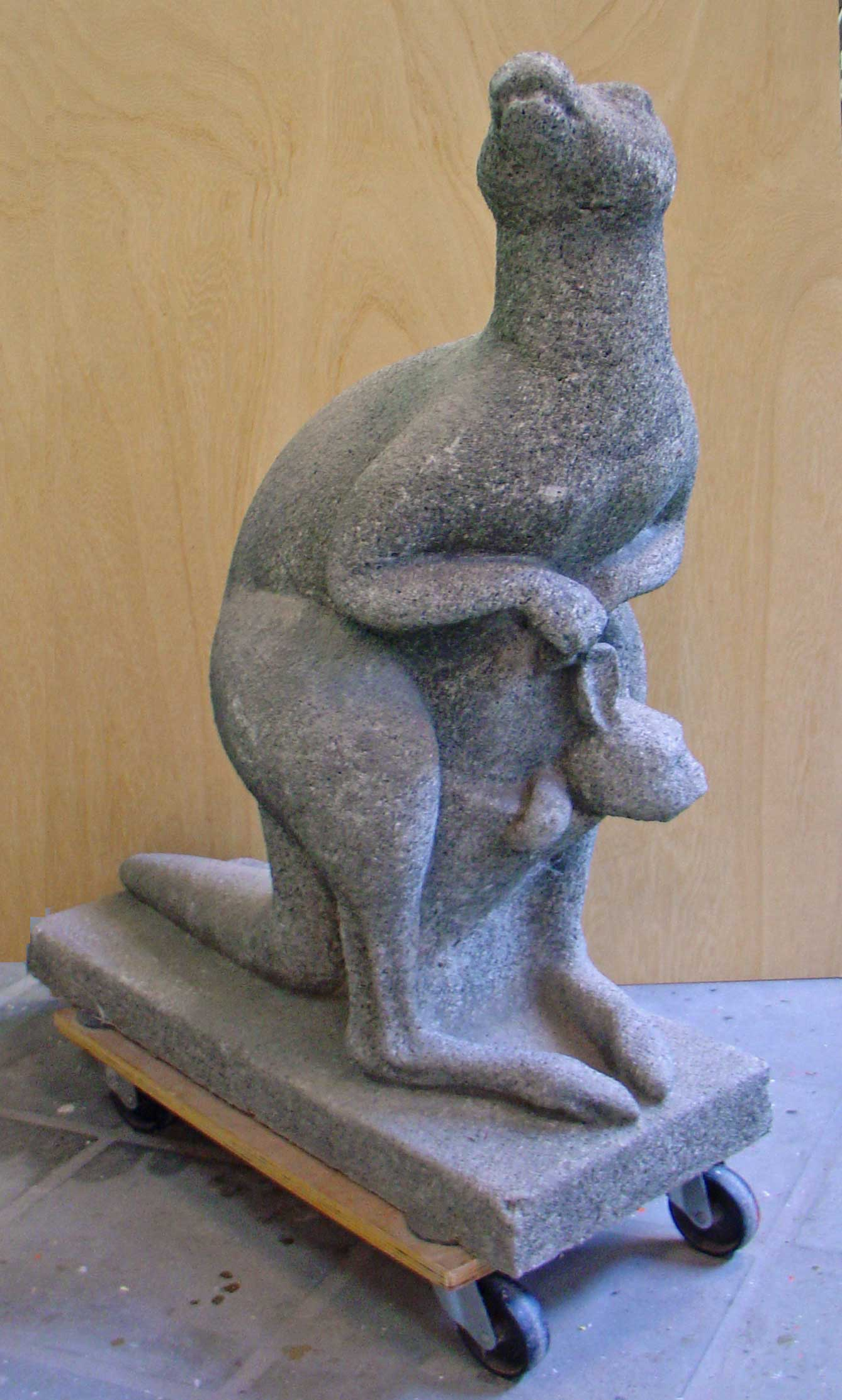 De kangoeroe (graniet, 1961) door Janneke Ducro-Kruijer - Van Heuven Goedhartsingel (tijdelijk opgeslagen) Gouda